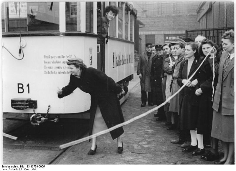 Berlin, mobiler Bibliothekswagen, Einweihung Zentralbild Schack 3.3.52. Die erste fahrbare Bücherei der BVG. Die Berliner Verkehrs-Gesellschaft stellte am 3.3.52 im Omnibus-Bahnhof Treptow ihren ersten fahrbaren Büchereiwagen in den Dienst. Diese Bücherei enthält ungefähr 2.200 Bände Fachliteratur, politische Bücher, erzählende und allgemeinbildende Literatur. UBz: Jetzt kann die Fahrt losgehen. Leihweise Zentral Bild